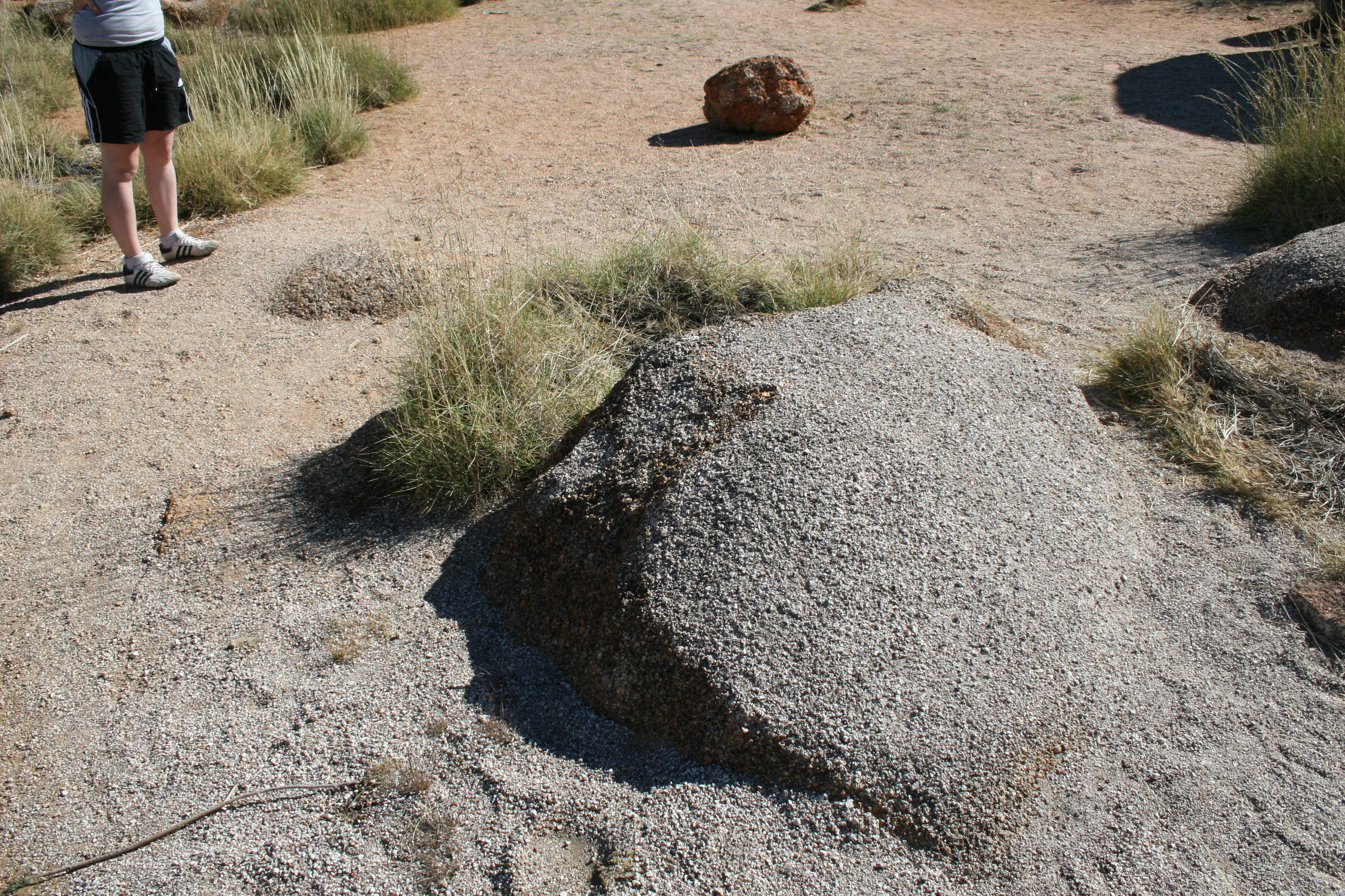 Verwitterter Marble vom Karlu Karlu